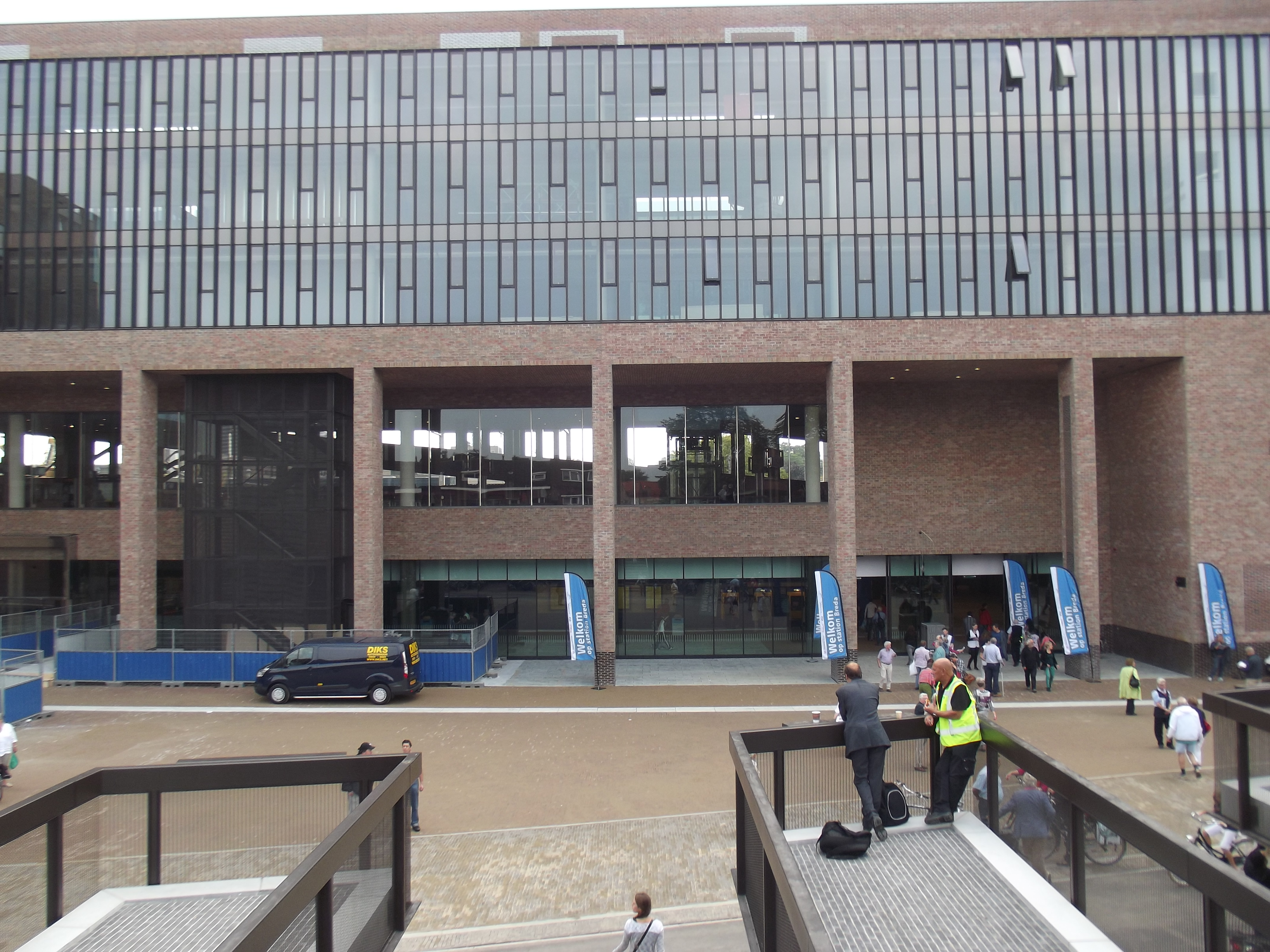 Station Breda, de Belcrumkant tijdens de openingsweekend 6/7 september 2014. Ingang Belcrumkant